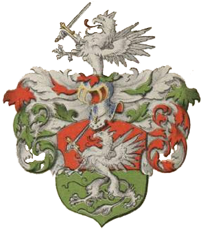 Cahdeuse suguvõsa aadlivapp